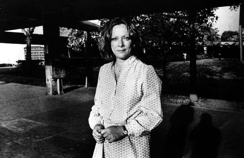 Fotografía capturada por Vasco Szinetar en la Universidad Central de Venezuela